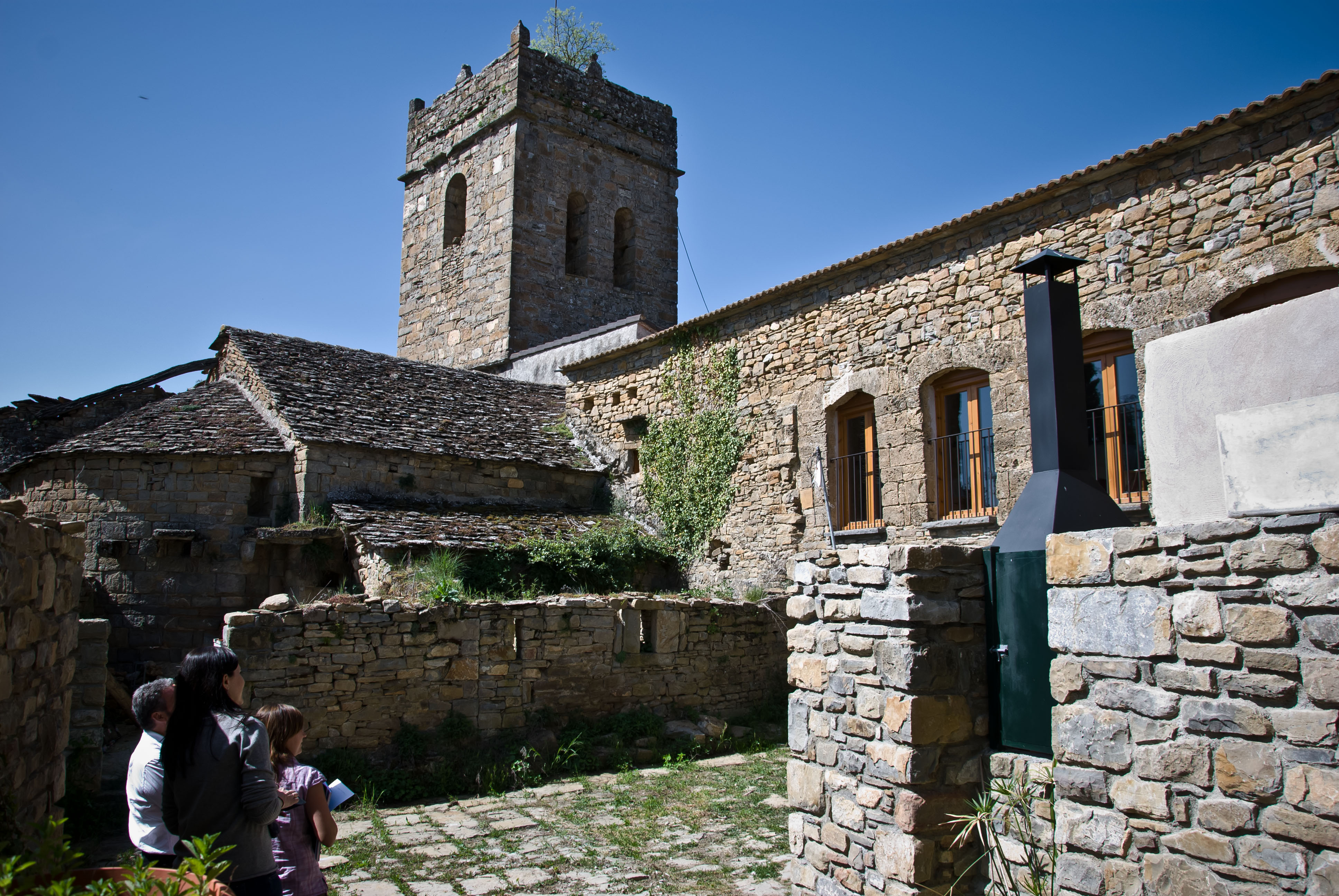 Casa de los Mur, junto a la iglesia.